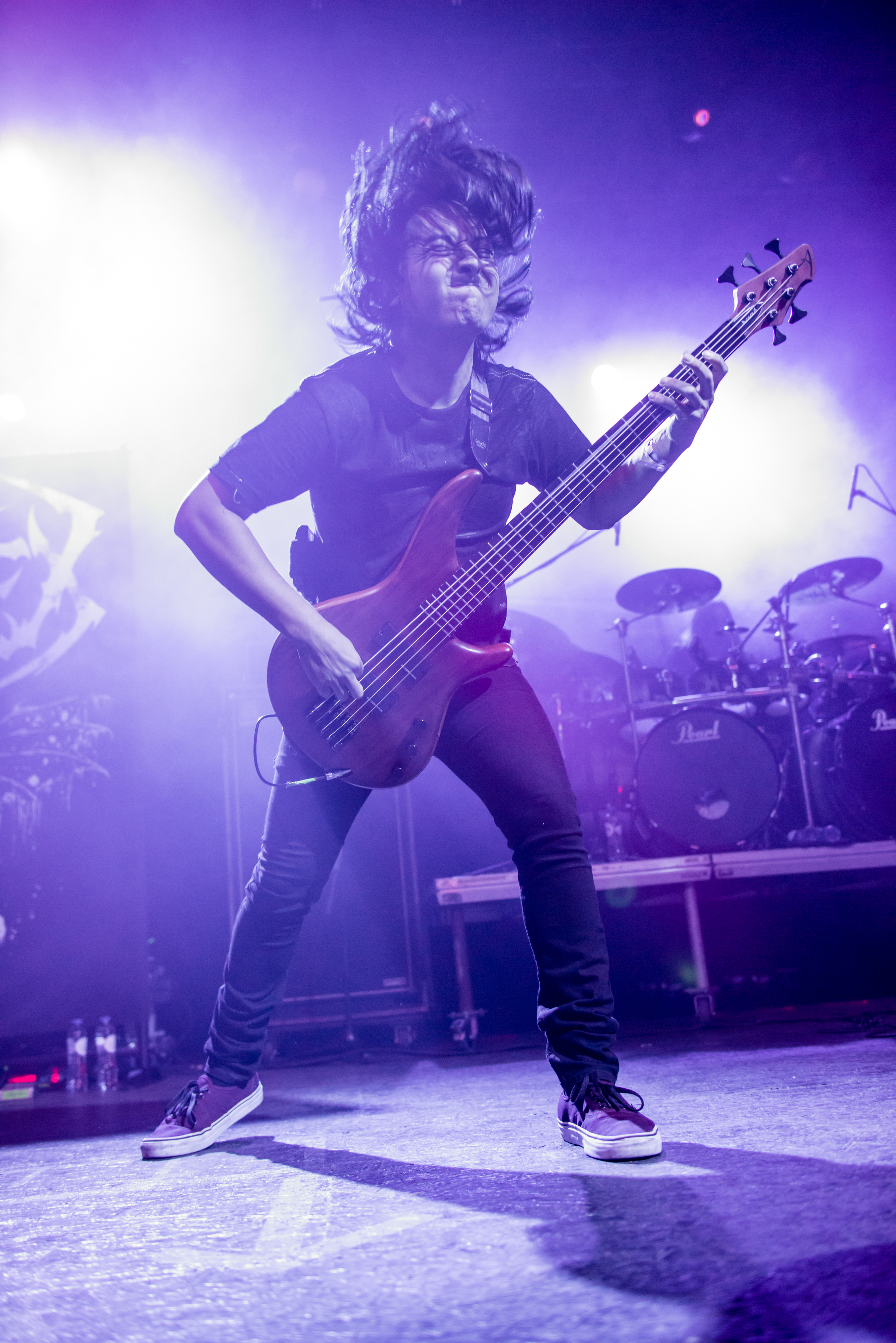 'Impericon Festival 2015; Oberhausen Turbinenhalle': 'Carnifex'